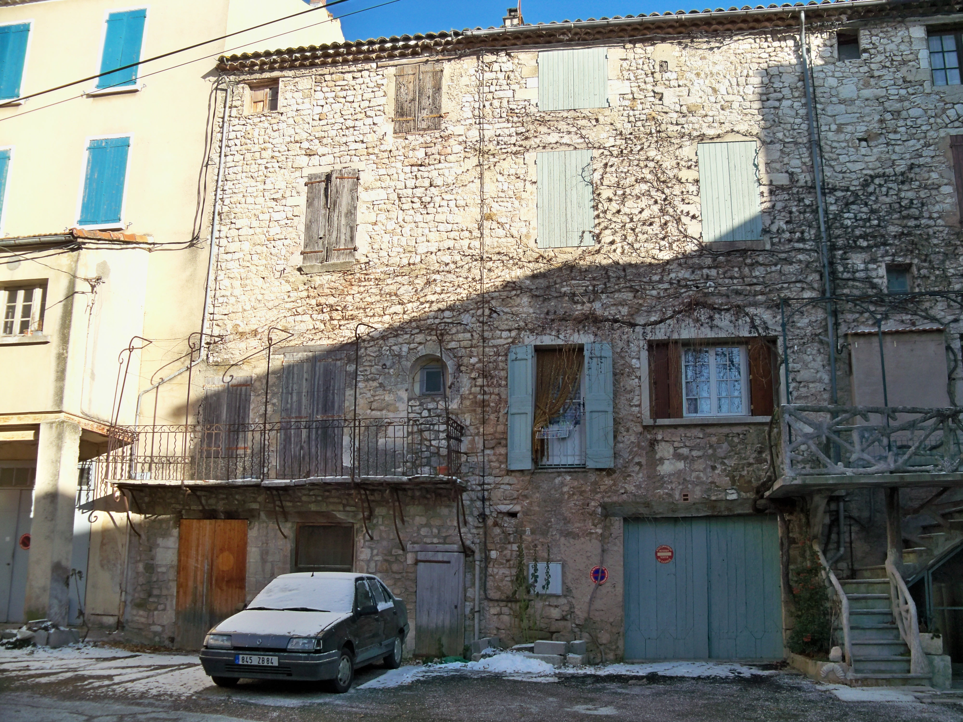 Maison en hauteur à Sault (Vaucluse)